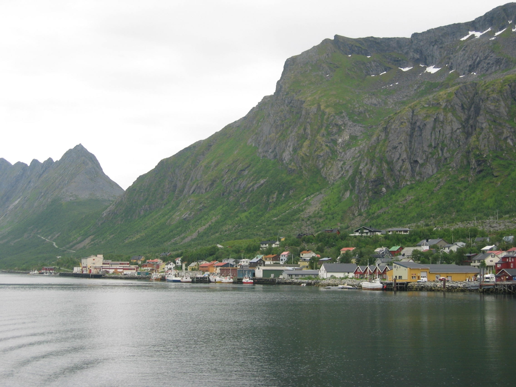 Gryllefjord i dag, med Gryllefjord Fryseri & Kjøleanlegg til venstre.